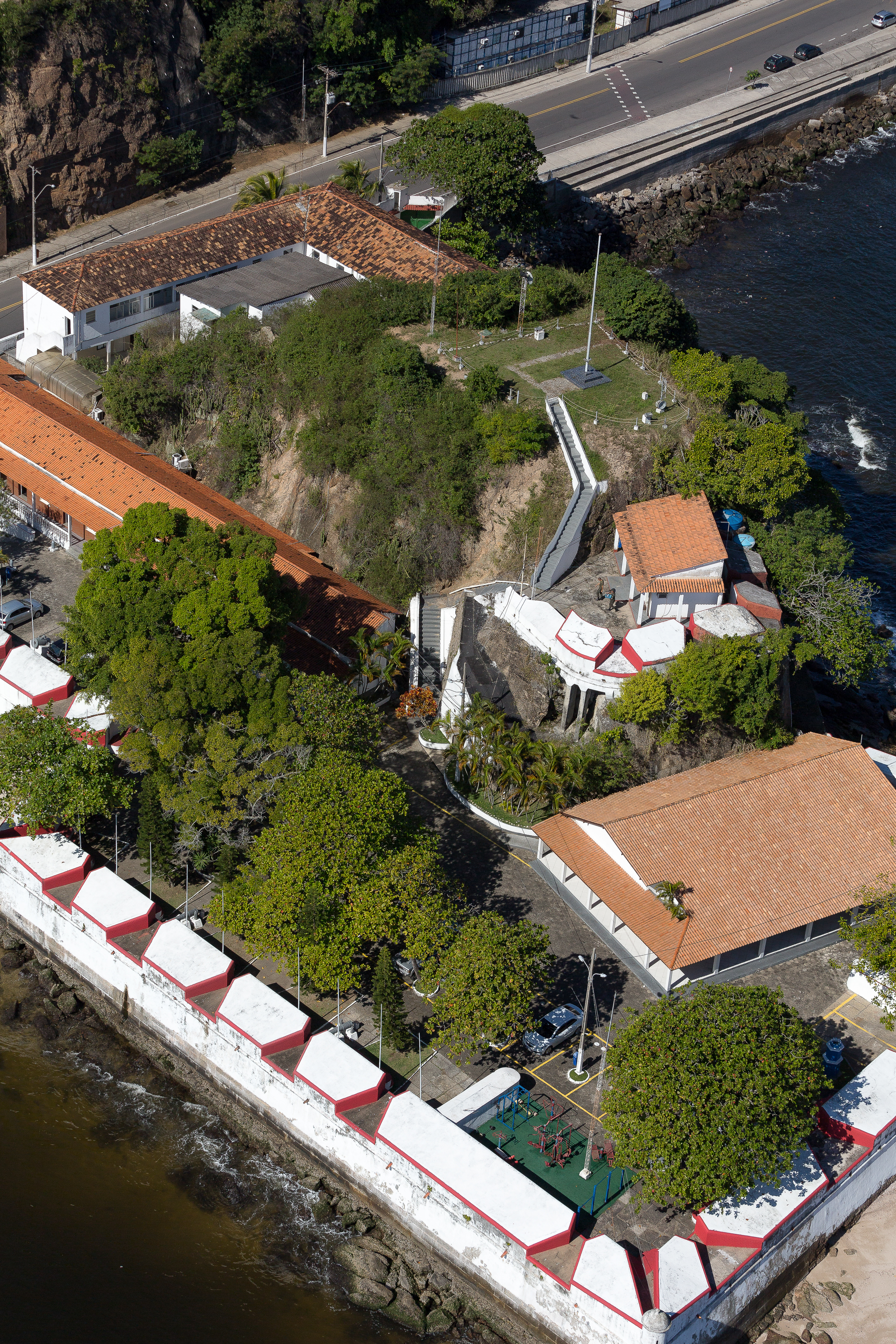 Vista aérea do Forte de São Domingos de Gragoatá localizado na cidade de Niterói - RJ - Brasil.